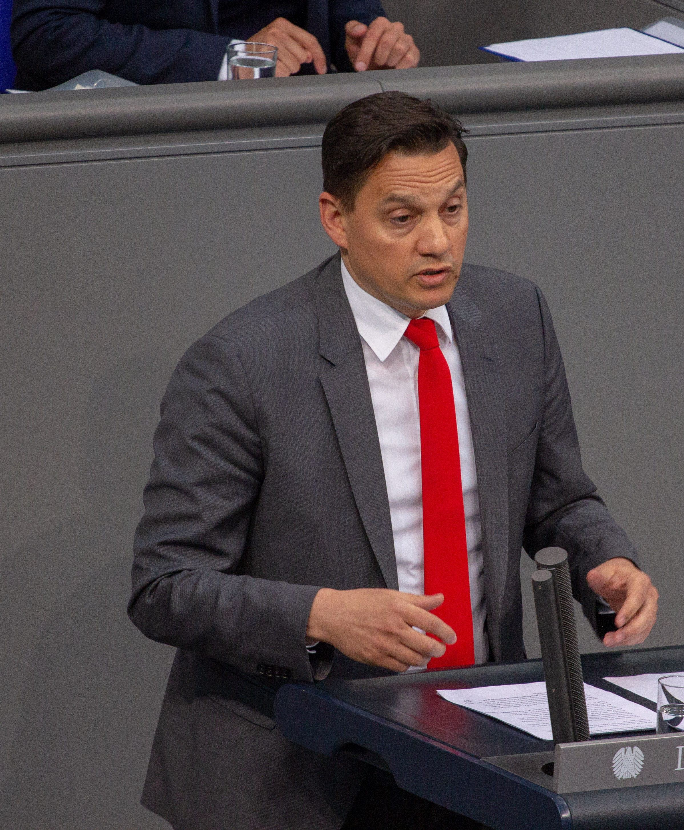 Johannes Fechner, Mitglied des Deutschen Bundestages, während einer Plenarsitzung am 12. April 2019 in Berlin.